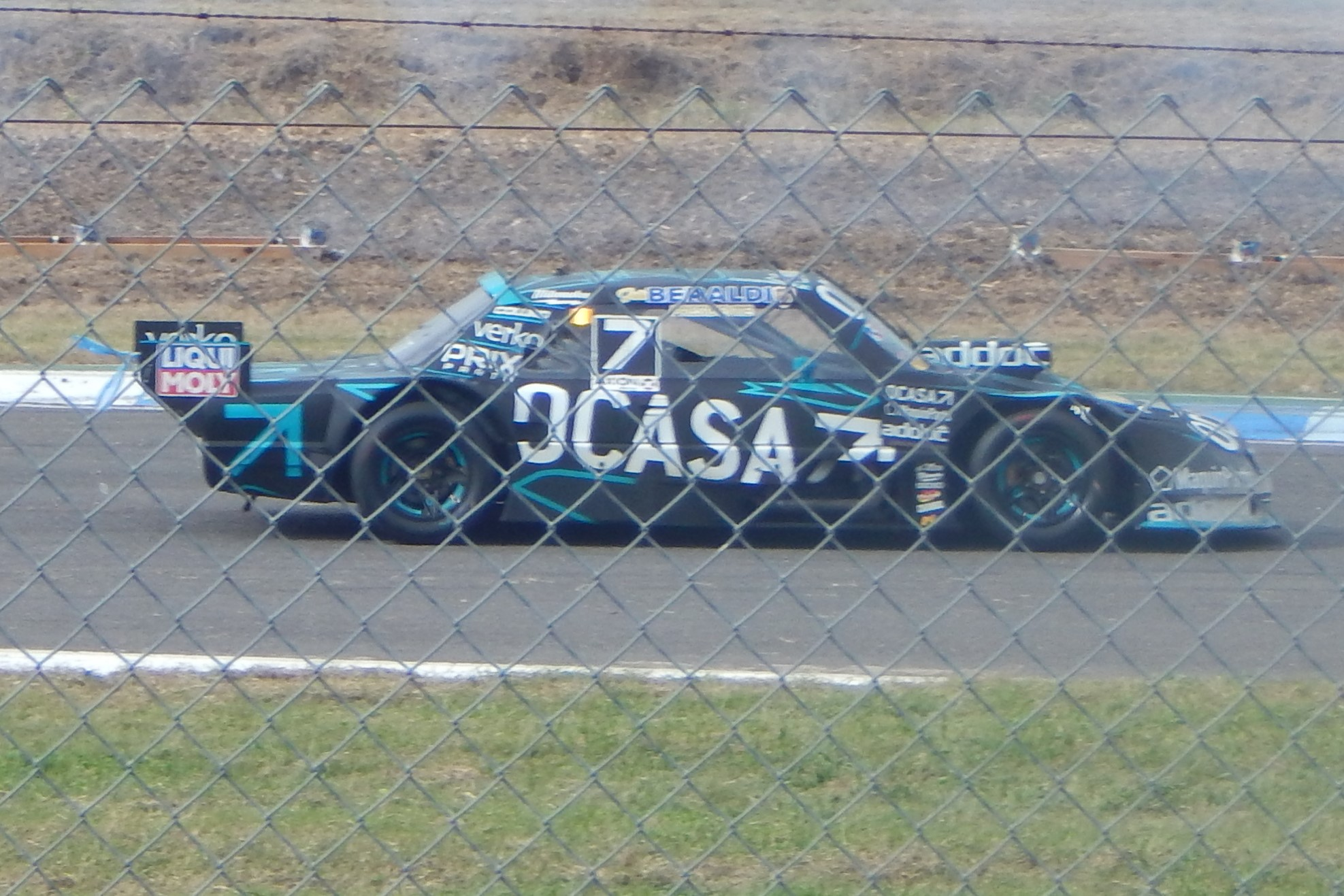 Leonel Pernía, TC Rafaela 2019.